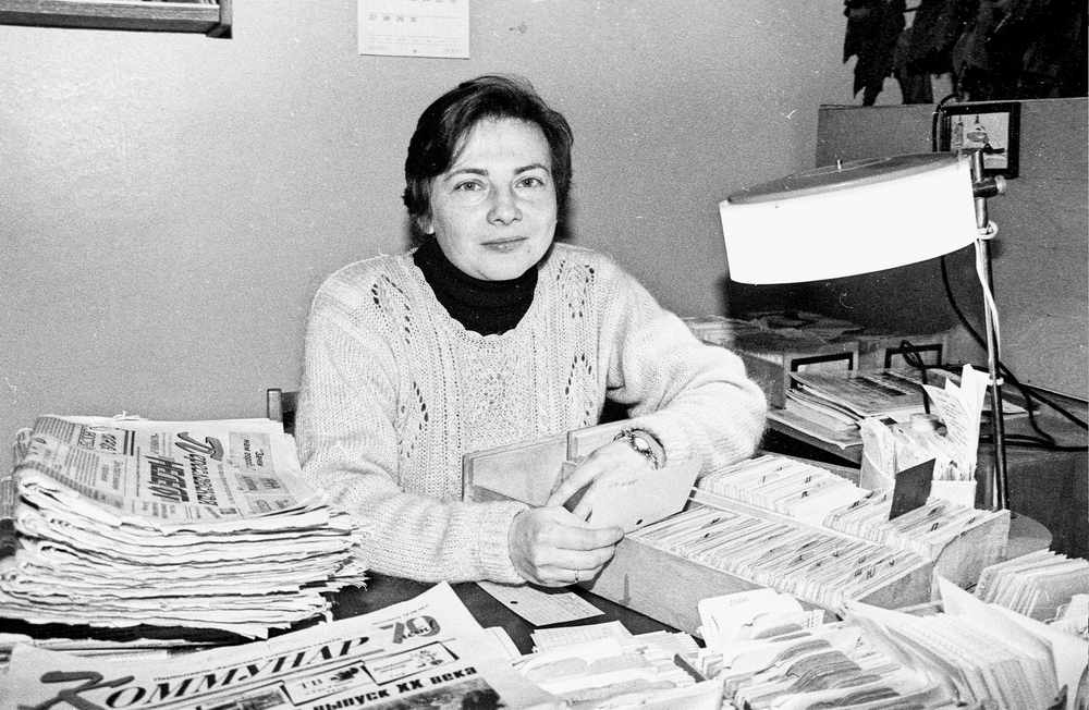 Наталия Алексеевна Самара (20.01.1963) — библиограф, заведующая информационно-библиографическим отделом Центральной городской библиотеки имени А. П. Малашенко (1987—2011), учёный секретарь Переславского музея-заповедника (с ноября 2011). В ноябре 2000 года награждена знаком «За достижения в культуре». Снимок сделан в Центральной городской библиотеке имени А. П. Малашенко, Переславль, улица 50 лет Комсомола, дом 1.